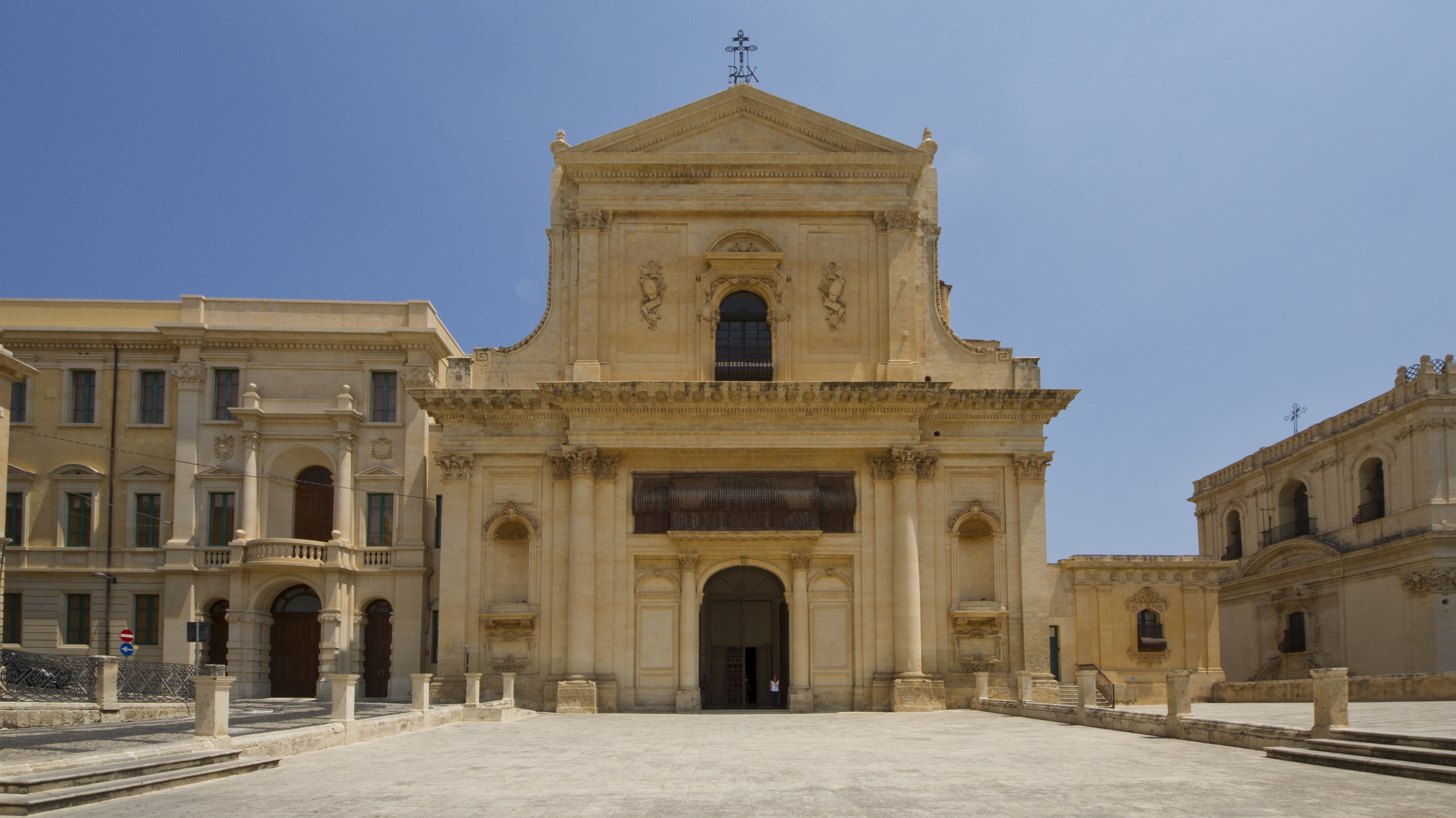 Chiesa SS Salvatore